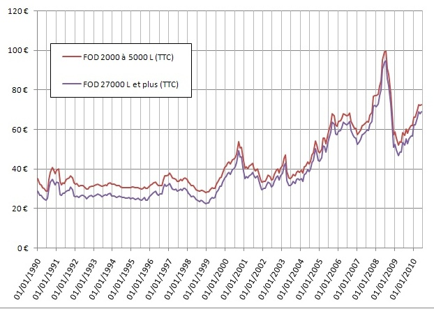 Courbe de l'èvolution des prix du fioul FOD en euros/hL depuis 1990 Using data from Les prix de vente moyens des carburants, du fioul domestique et des fiouls lourds en France, en euros.